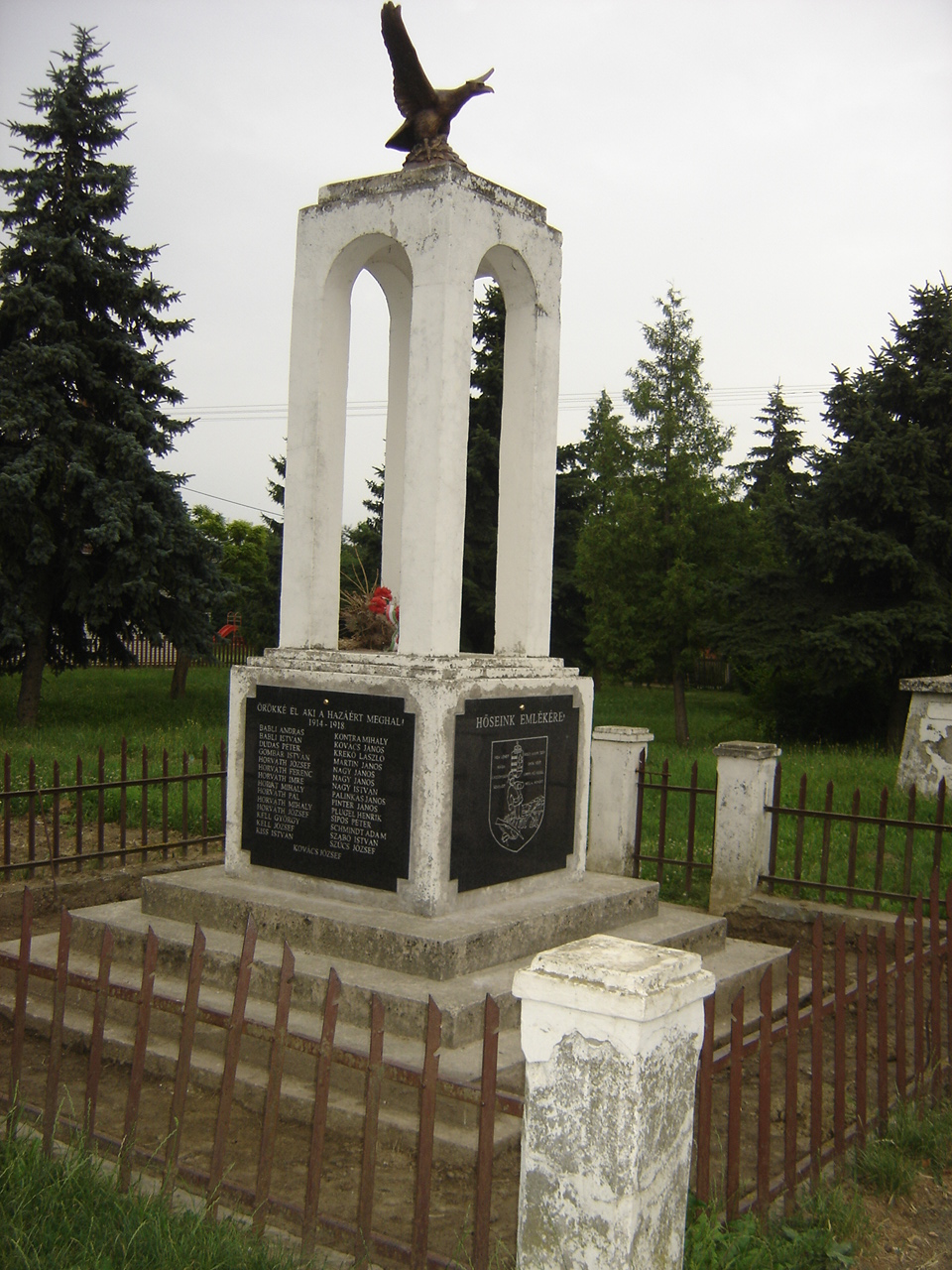 Novi Bezdan, spomenik poginulima u ratovima